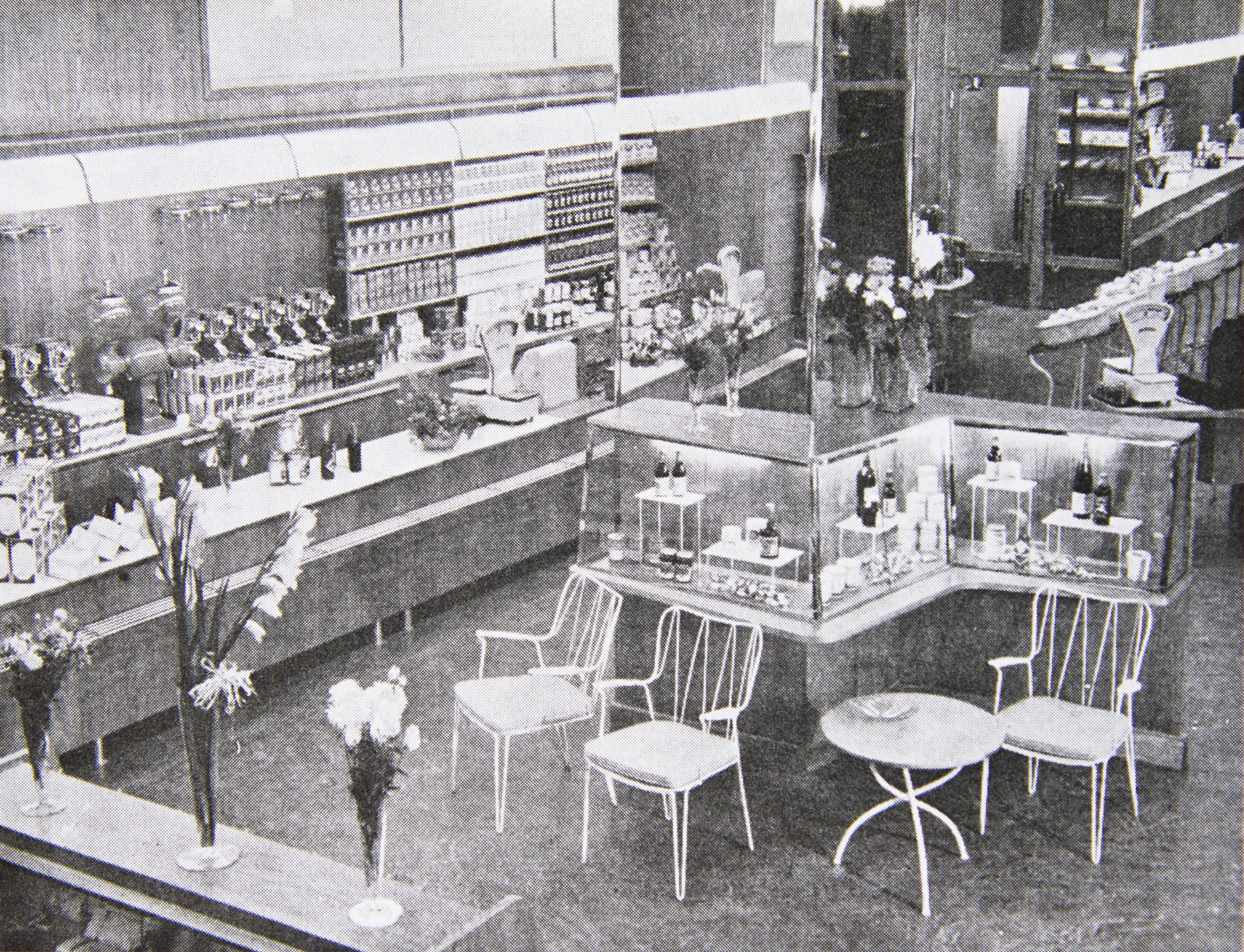 Stockmannin Herkku remontin jälkeen 1950-luvun alussa.